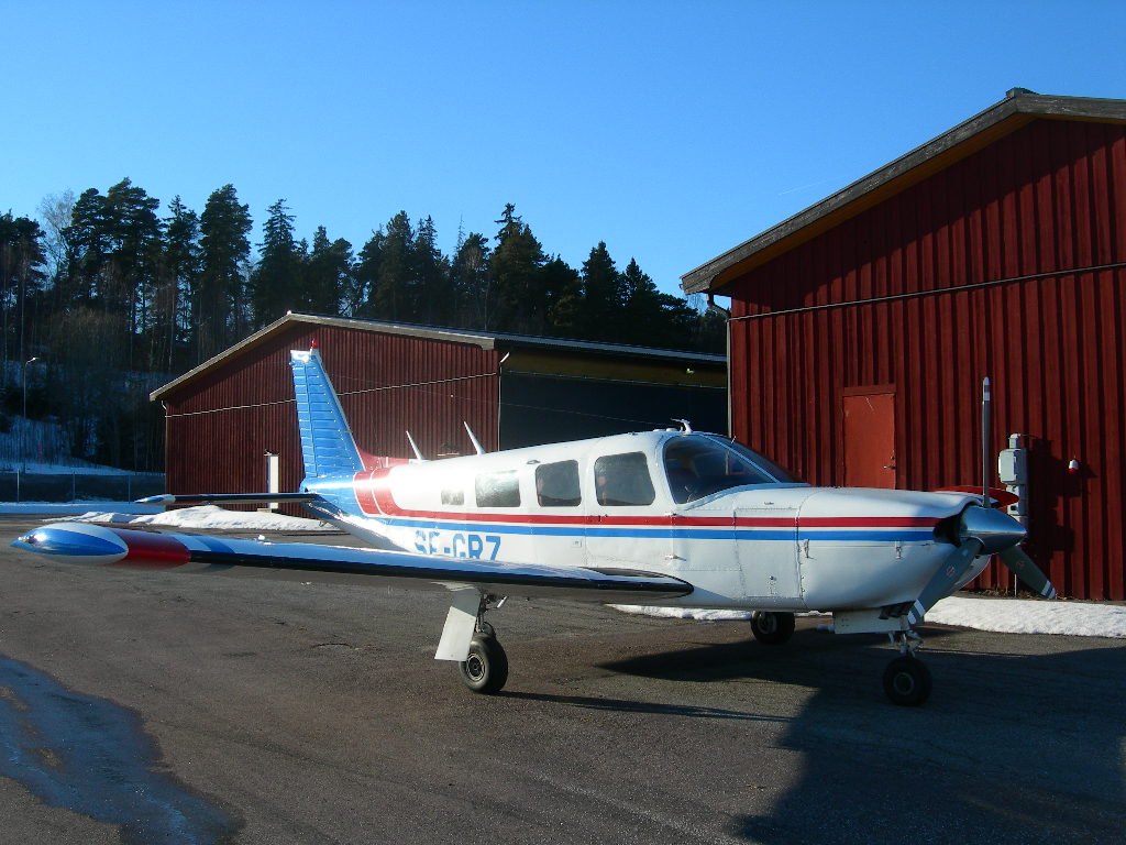 Piper PA-32R-300 Cherokee Lance SE-GRZ